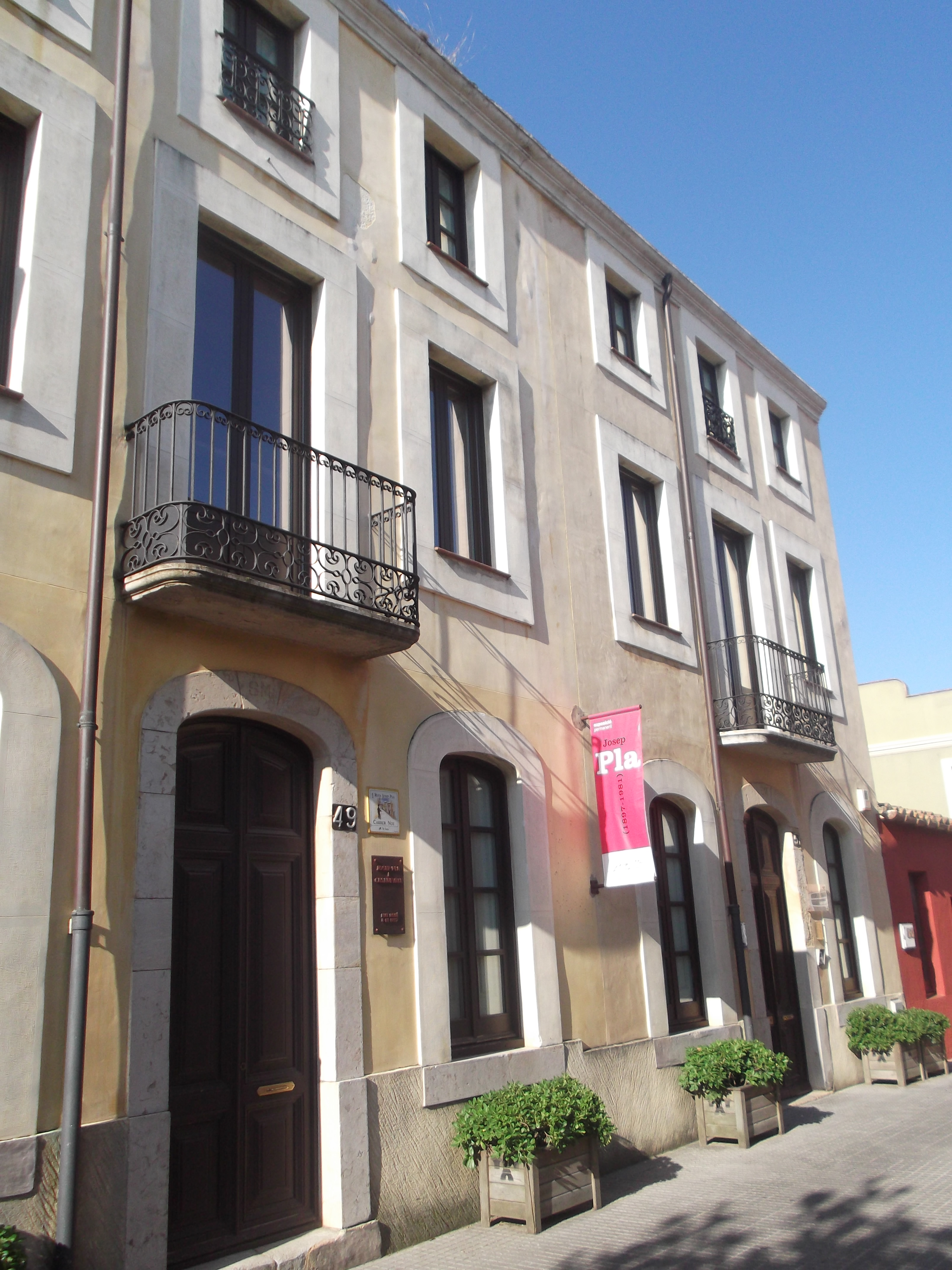 Façana Fundació Josep Pla